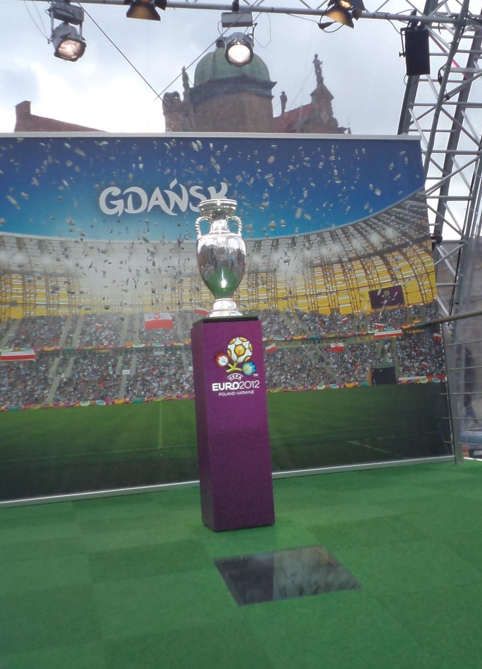 puchar Mistrzostw Europy podczas prezentacji w Gdańsku